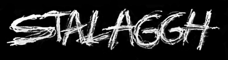 Text drawing on one of the album covers of Dutch-Belgian noise music project Stalaggh